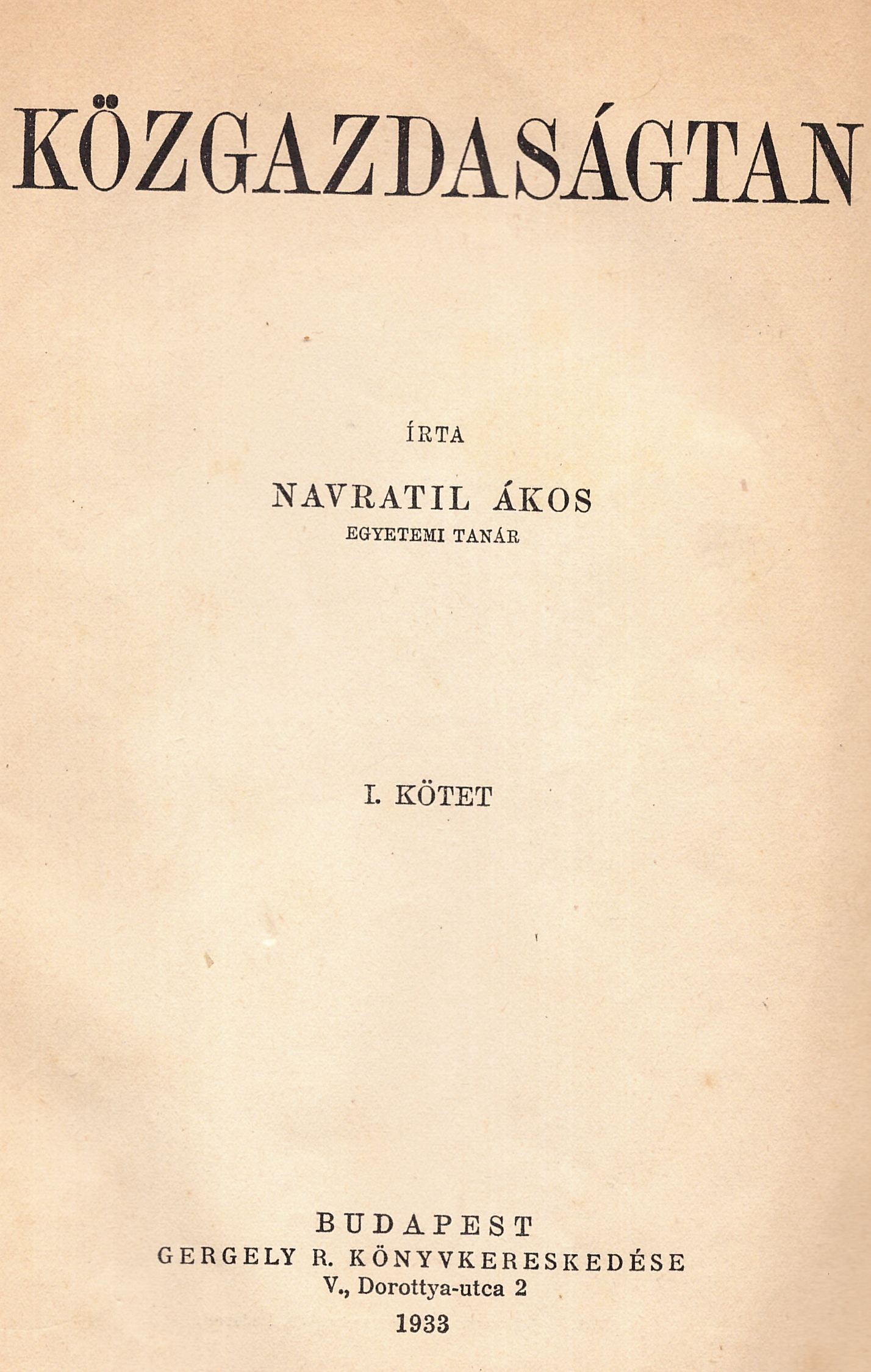 Navratil Ákos: Közgazdaságtan (1933)